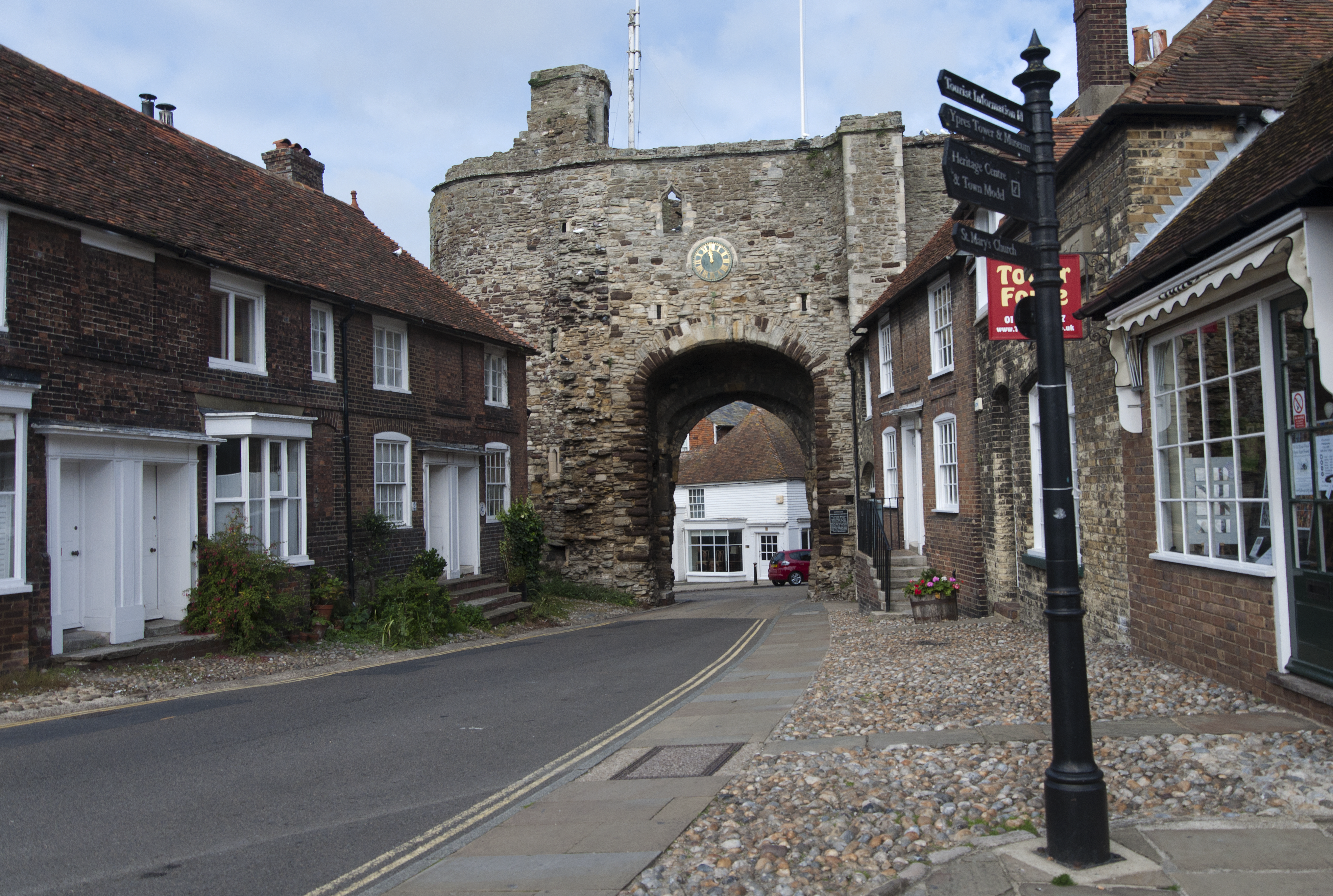 Achterzijde van de Landgate te Rye, Engeland